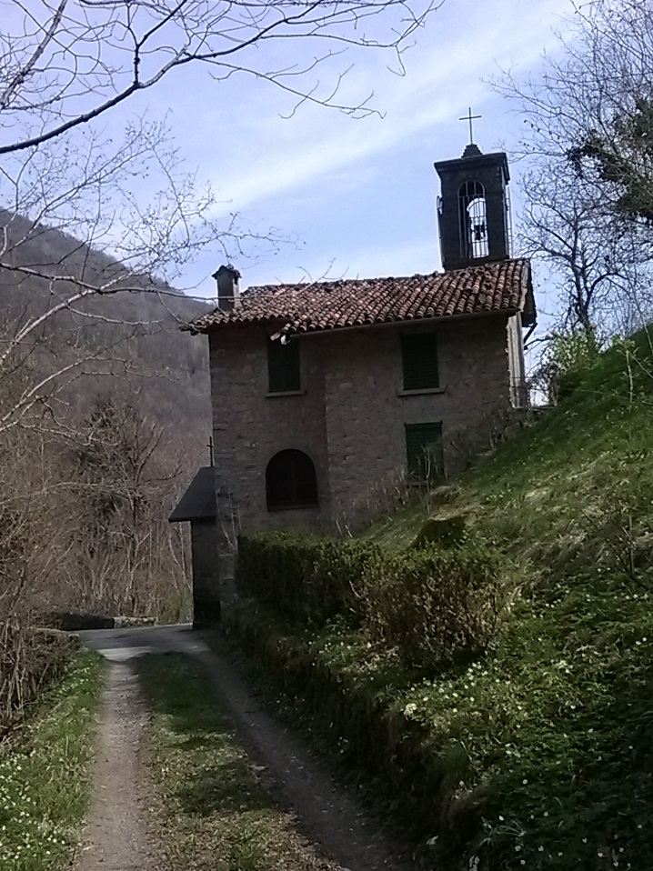 Chiesetta del Roncliscione, Gazzaniga (BG). Italy